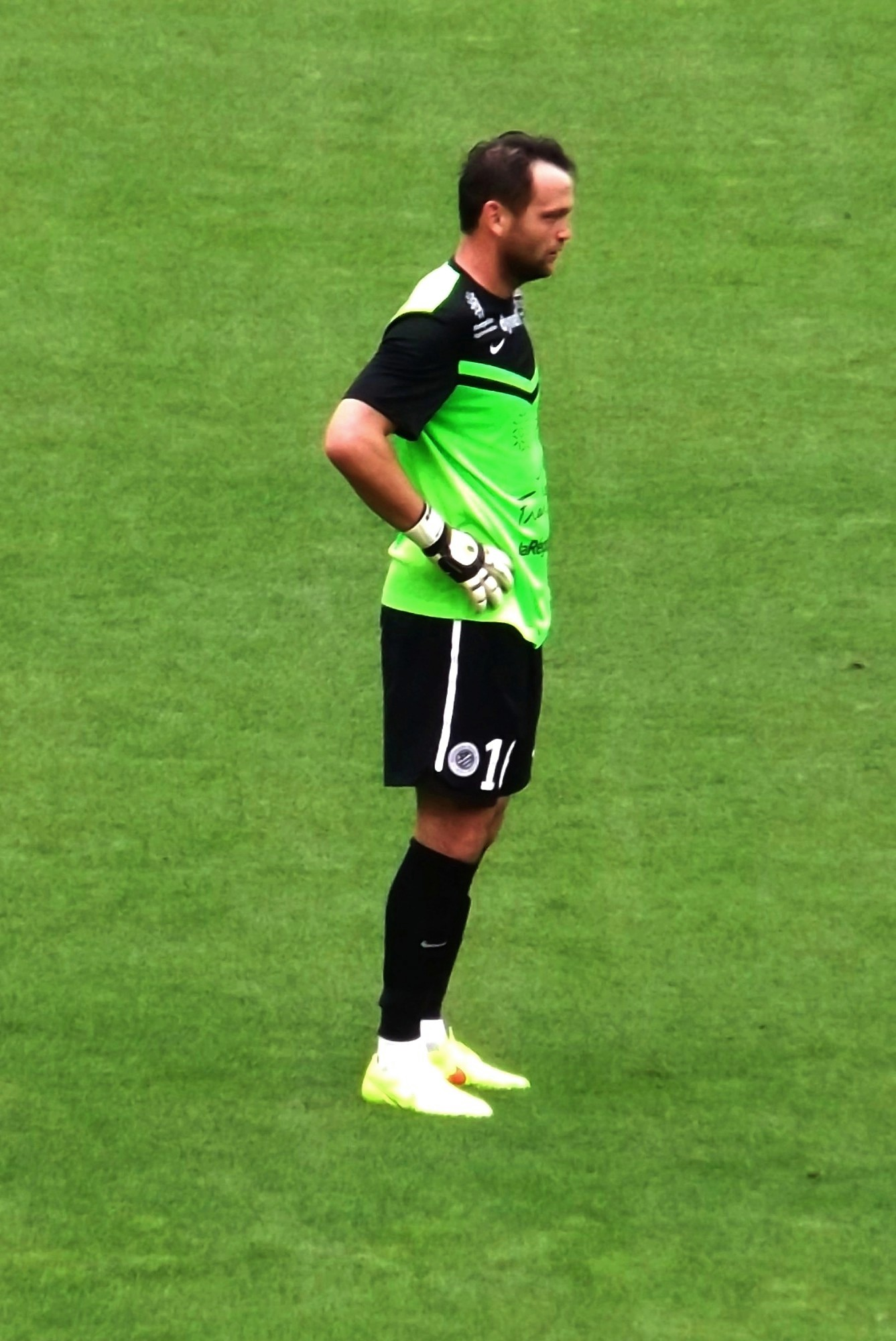 Geoffrey Jourdren, août 2014.